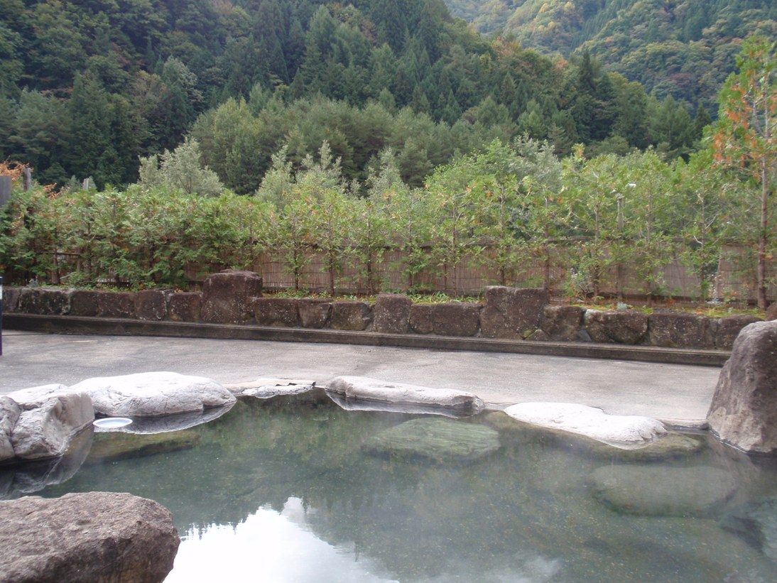 奥飛騨温泉郷、栃尾温泉、荒神の湯。